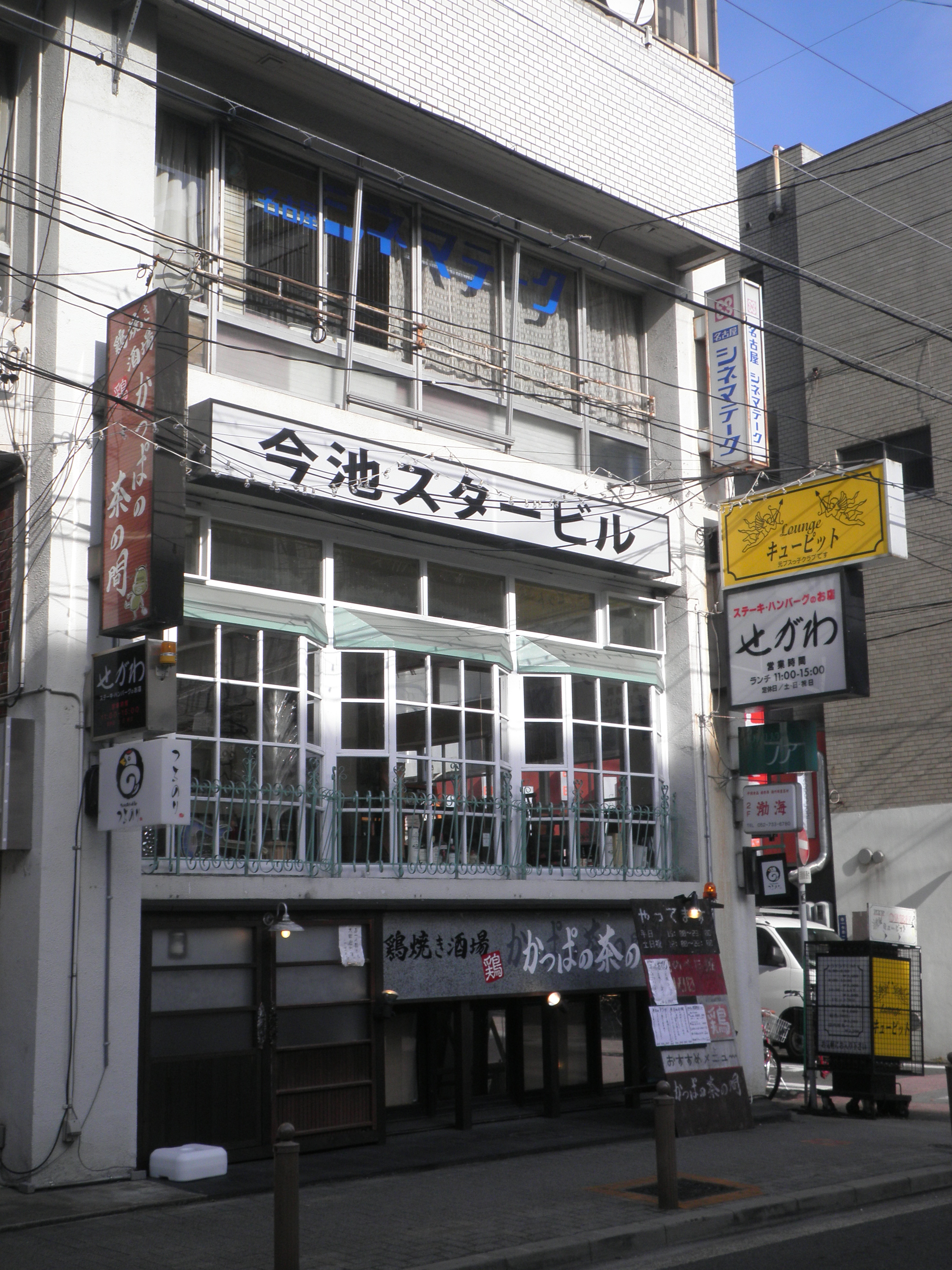 名古屋市千種区にある映画館「名古屋シネマテーク」のビル外観